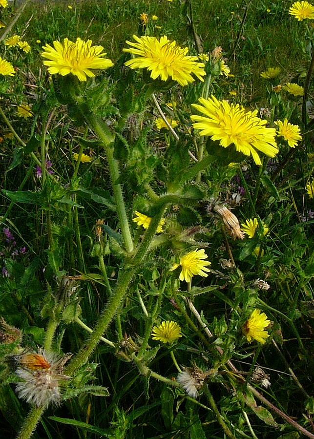 Blüte